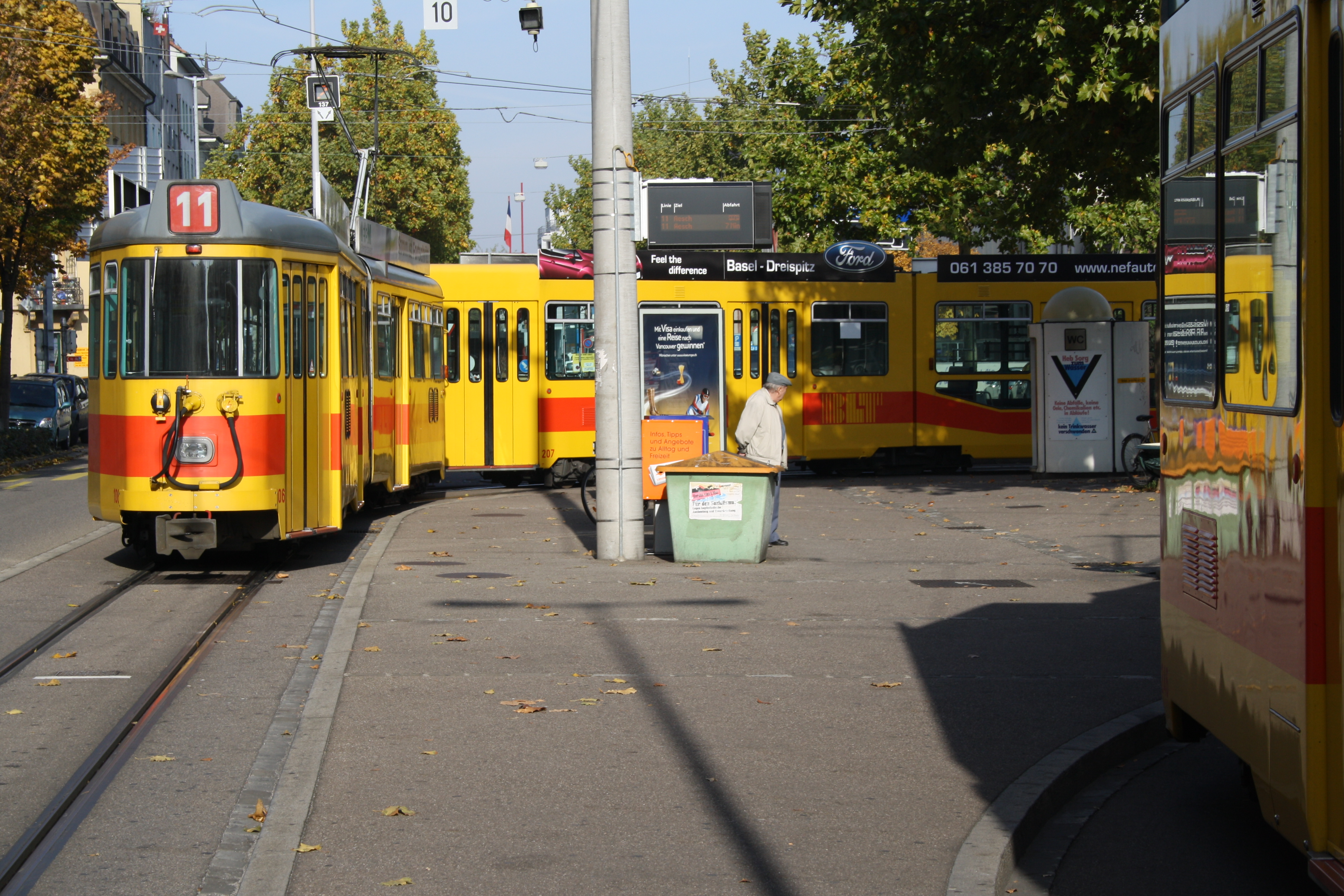 Tram Basel Saint-Louis Grenze